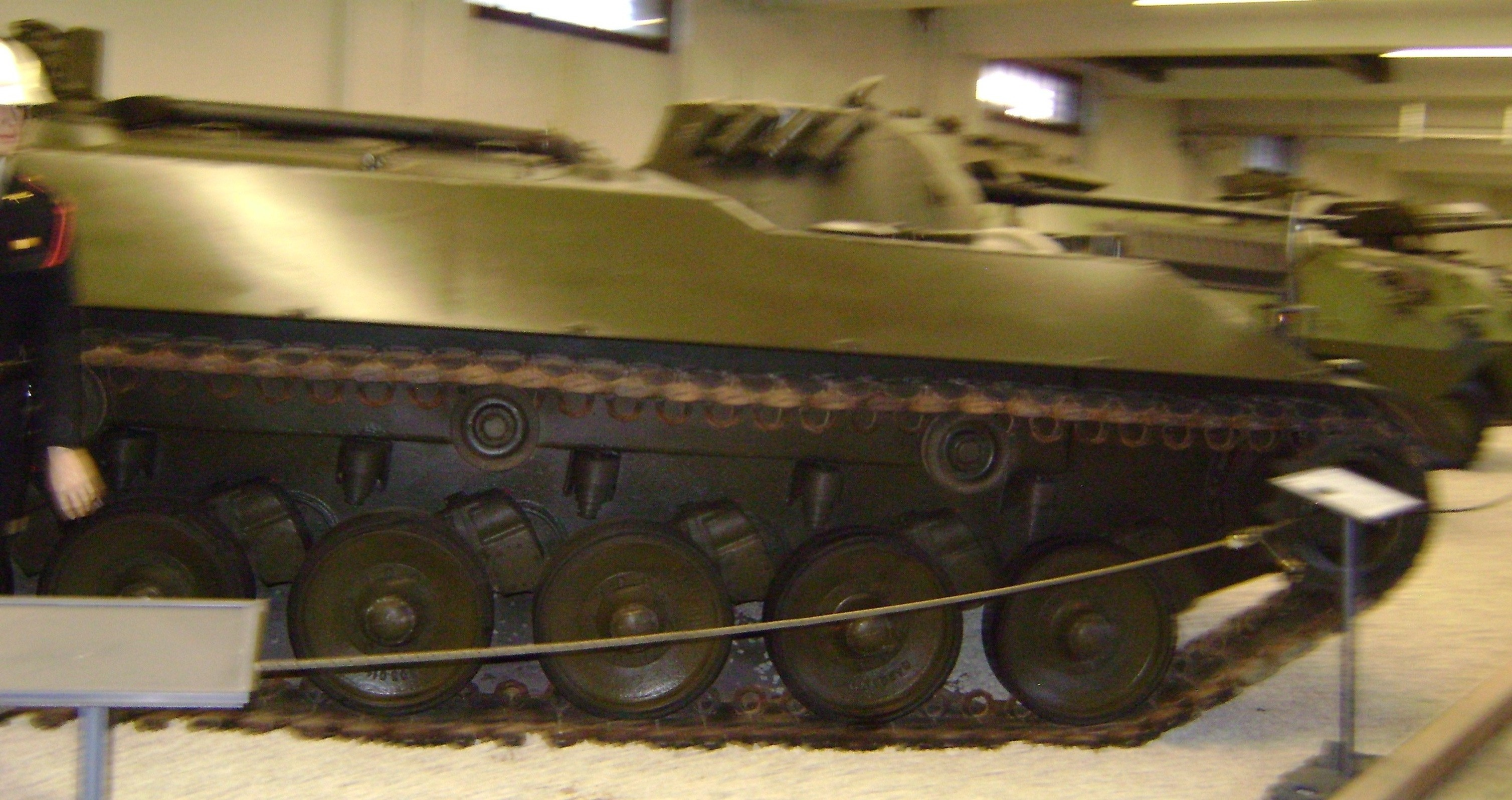 MOWAG 3M1 Schützenpanzer